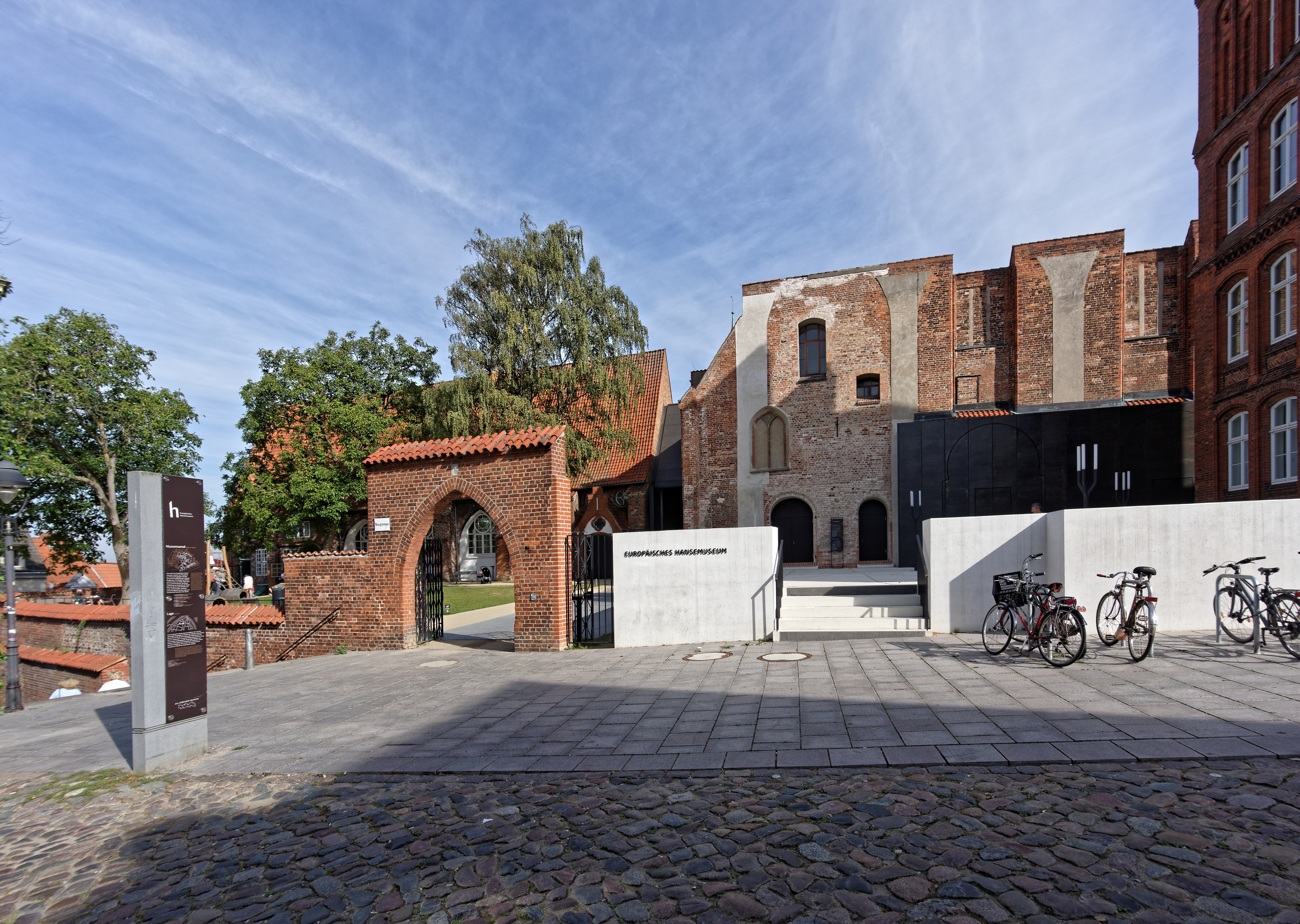 Eingang zum Europäischeansemusem von der Straße Hinter der Burg